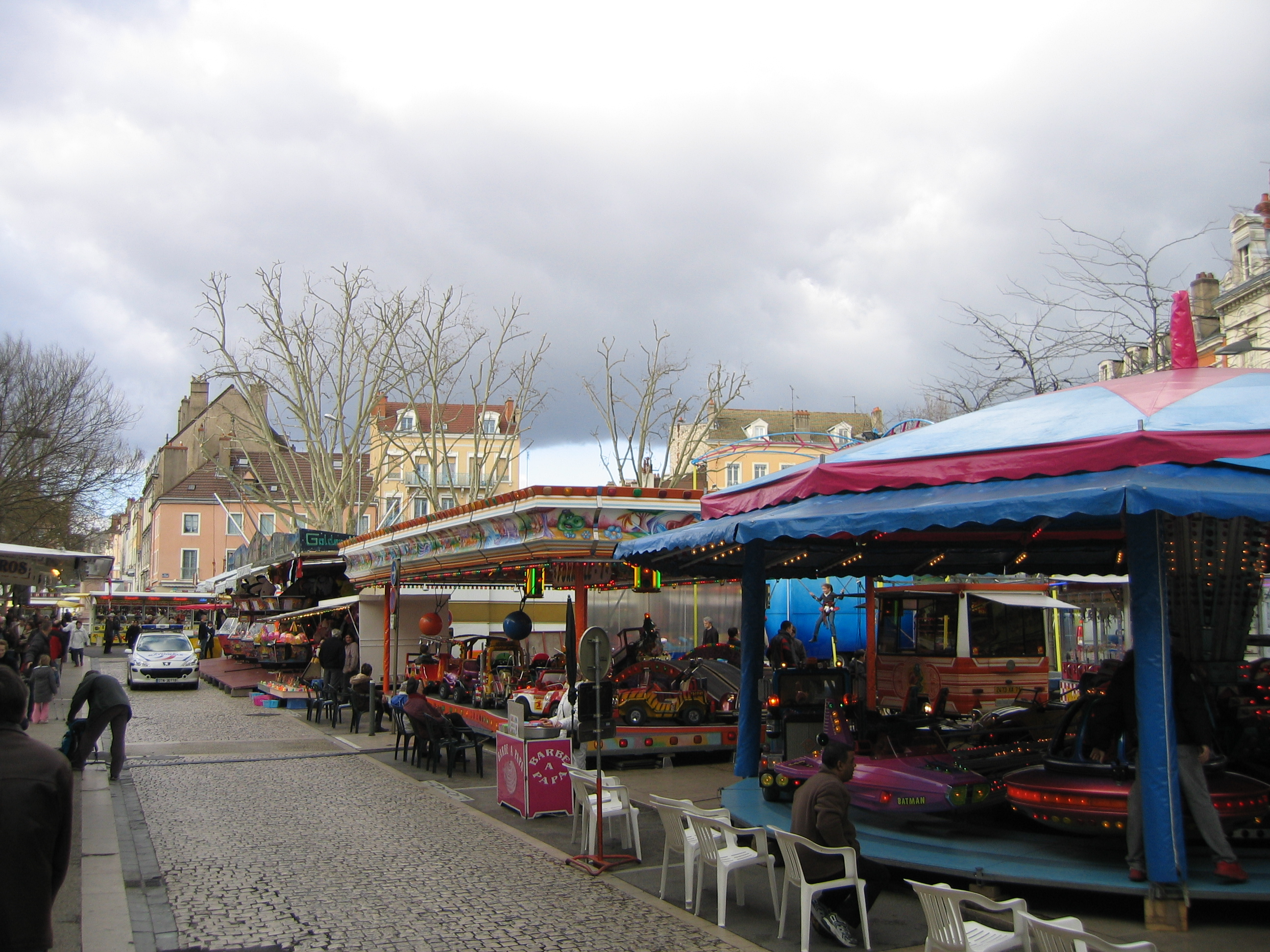 Fête foraine Chalon sur Saône pendant le carnaval 2008